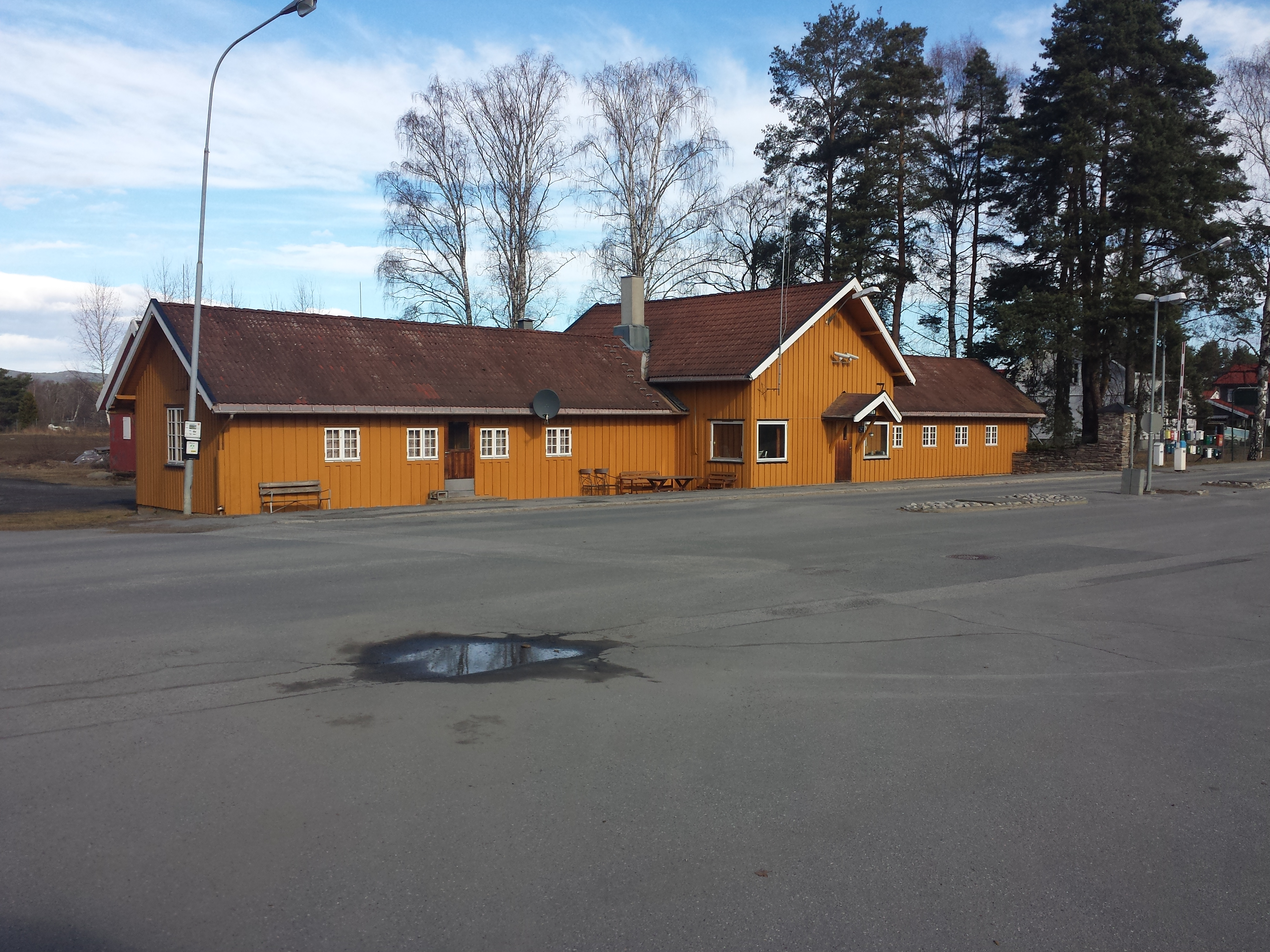 Her holdt portvakta til da det fortsatt var militærleir her.